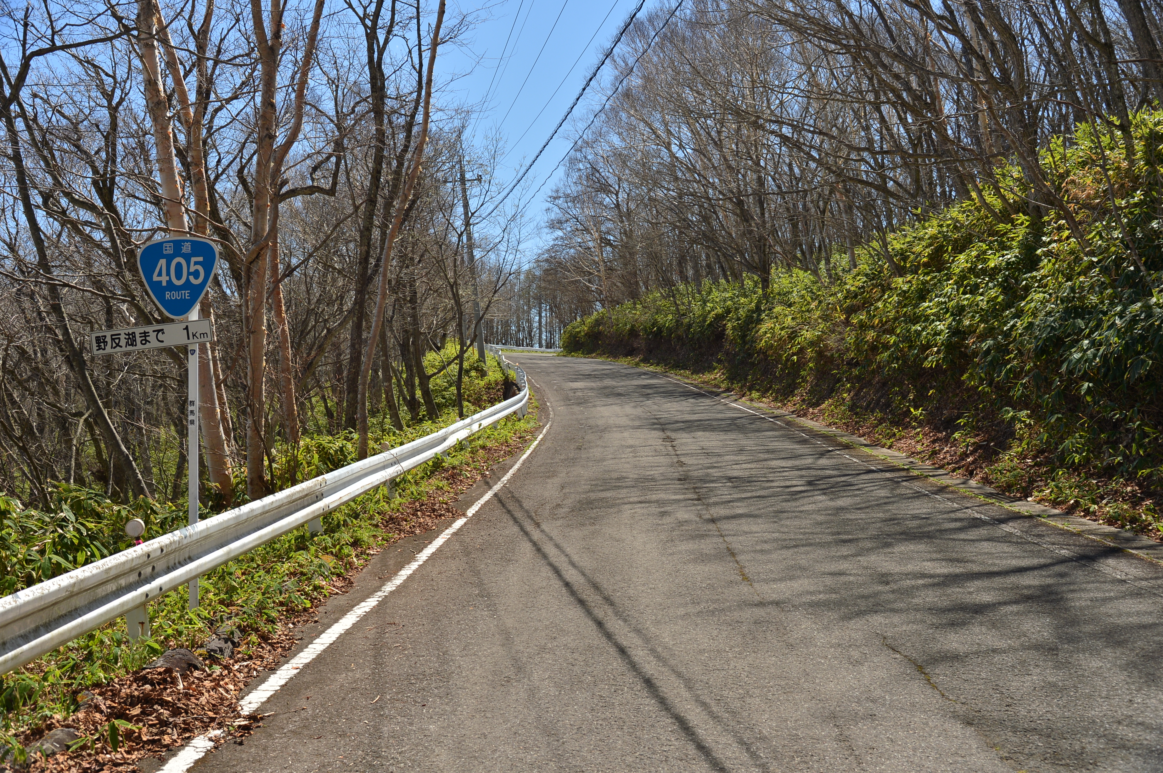 国道405号（群馬県中之条町入山）。野反湖まで1km手前の地点。群馬県内の国道405号は、野反湖で行き止まりになる。国道番号標識のポールには、いたずらで「国道97号」のステッカーが貼られている。